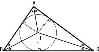 三角形の内心。オリジナル。放棄可能な著作権をすべて放棄したPDとして利用可能です。